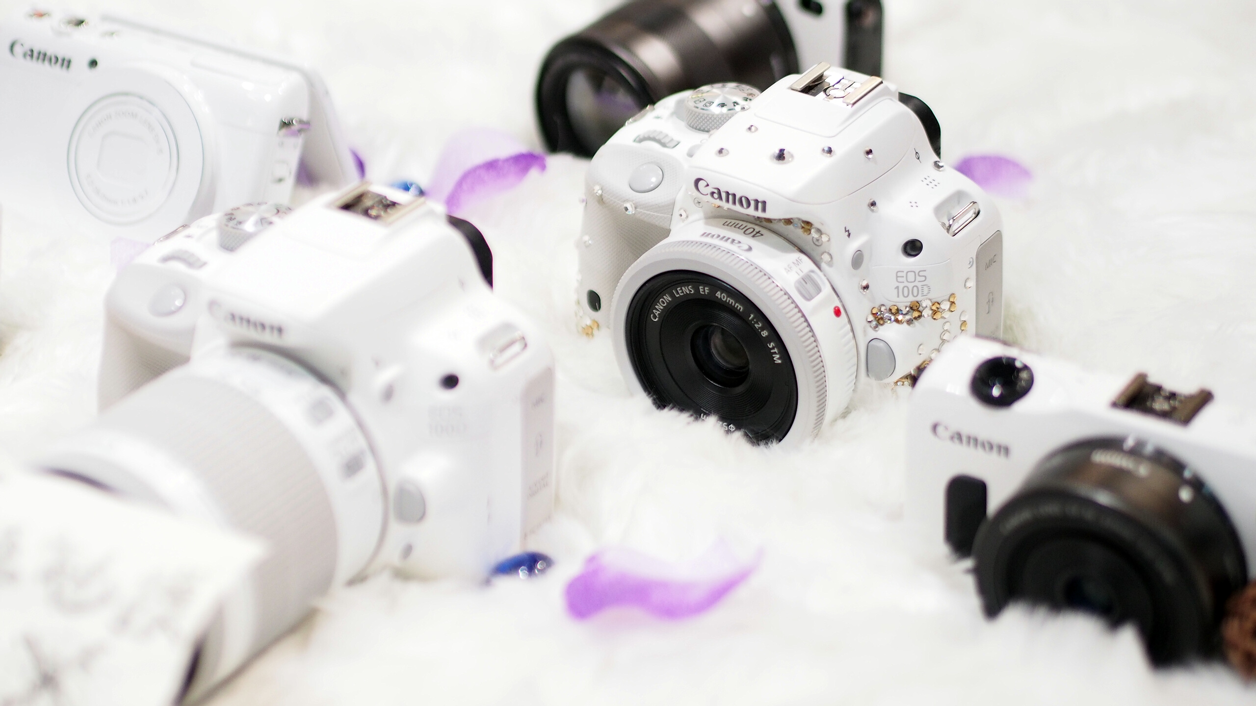 白色版的佳能 EOS 100D，中心右侧的机型配置白色版40mm STM镜头，左侧机型搭配的是白色版EF-S 18-55mm STM镜头。2014年P&E展